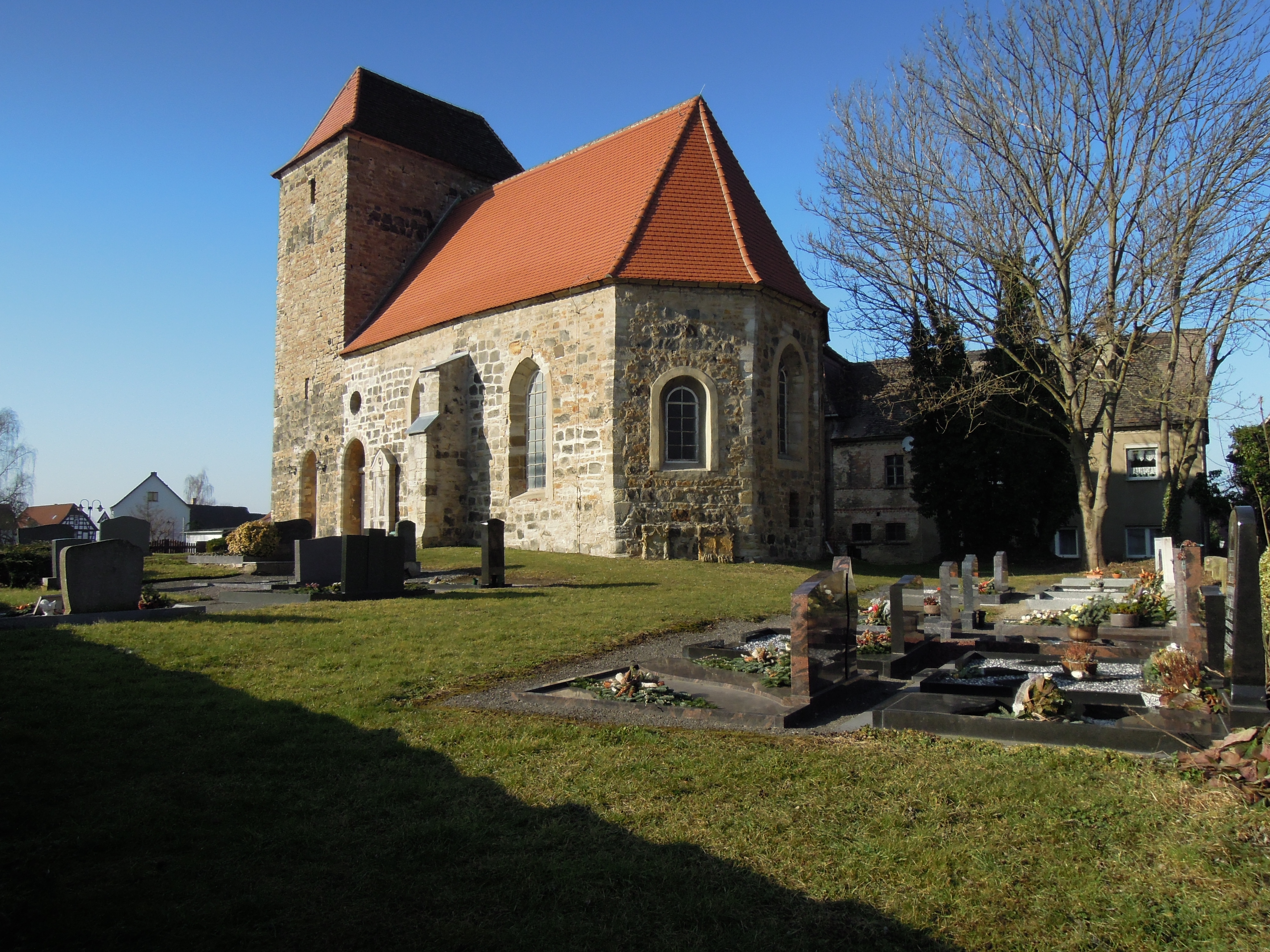 Kleingörschener Kirche (Blick von Südost) 2015